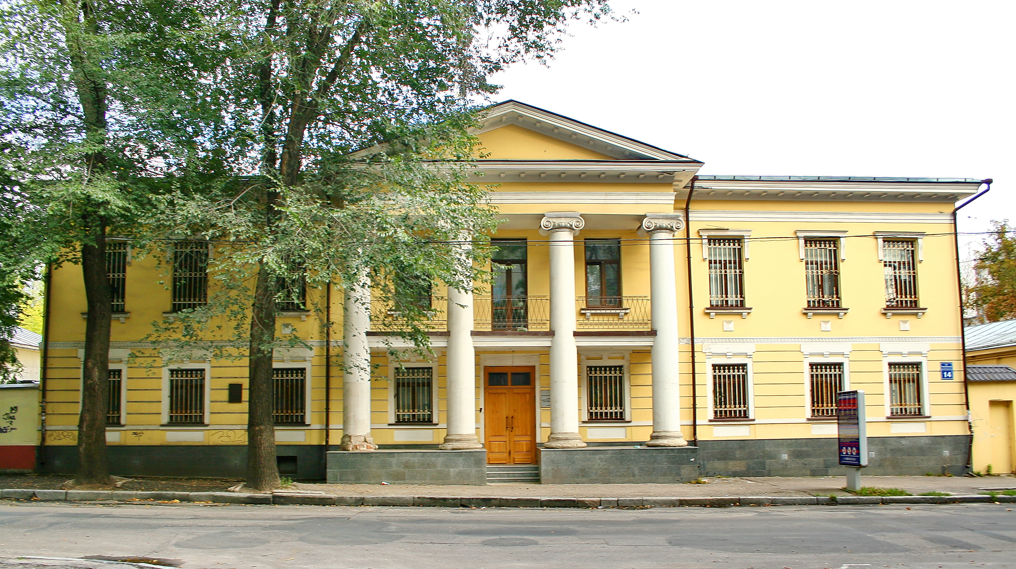 Усадебный дом и флигель, во дворе которого харьковские и пертроградськие красногвардейцы и солдаты 30-го запасного полка во главе с Н.А. Рудневым разоружили контрреволюционный автобронедивизион